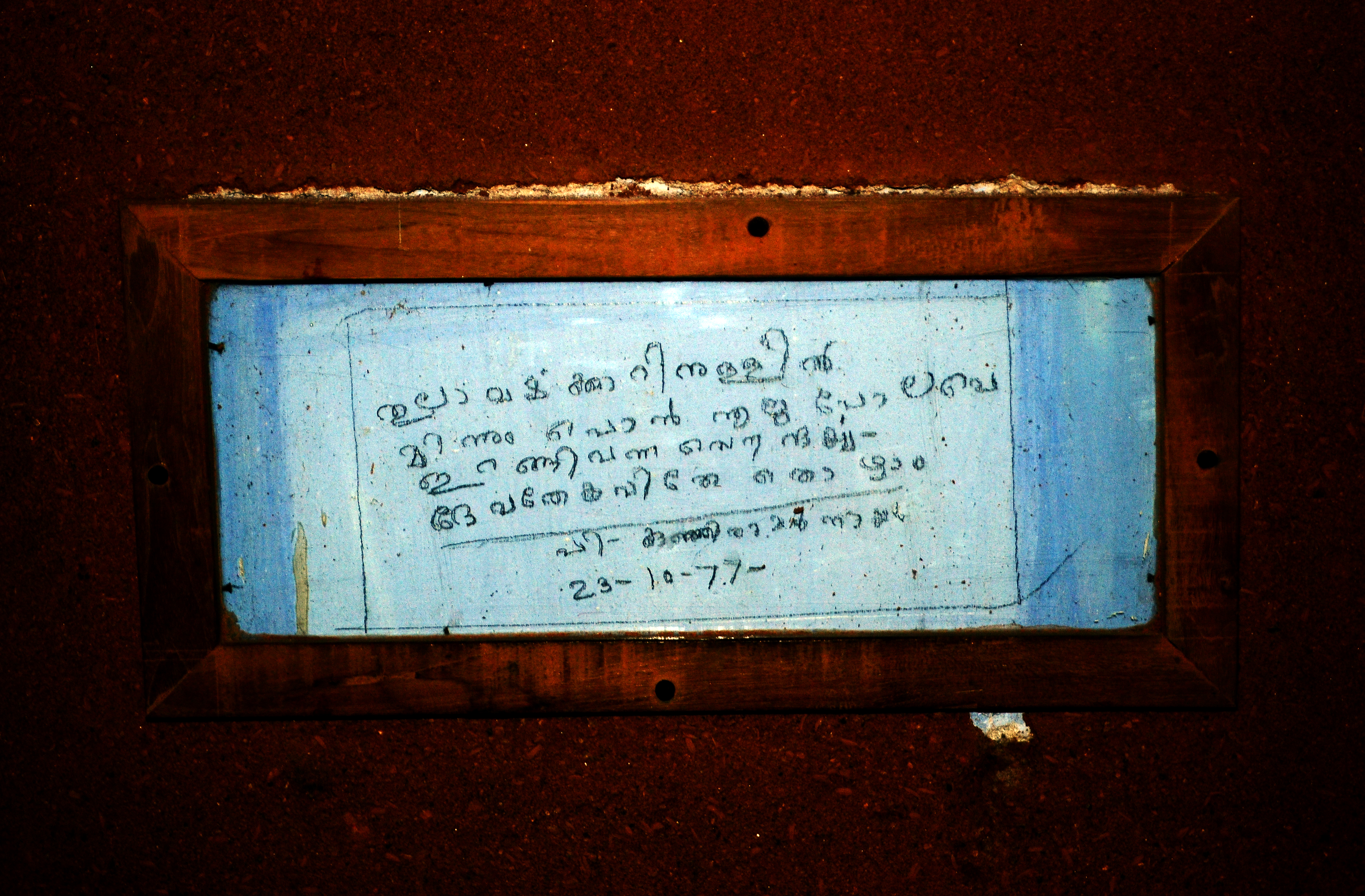 പാലക്കാട്‌, ലക്കിടി കിള്ളിക്കുറിശിമംഗലത്തെ, കുഞ്ചന്‍ നമ്പ്യാര്‍ ജനിച്ച കലക്കത്ത് ഭവനത്തില്‍ സൂക്ഷിച്ചിരിക്കുന്ന, മഹാകവി പിയുടെ കൈപ്പടയിലുള്ള കവിതാശകലം